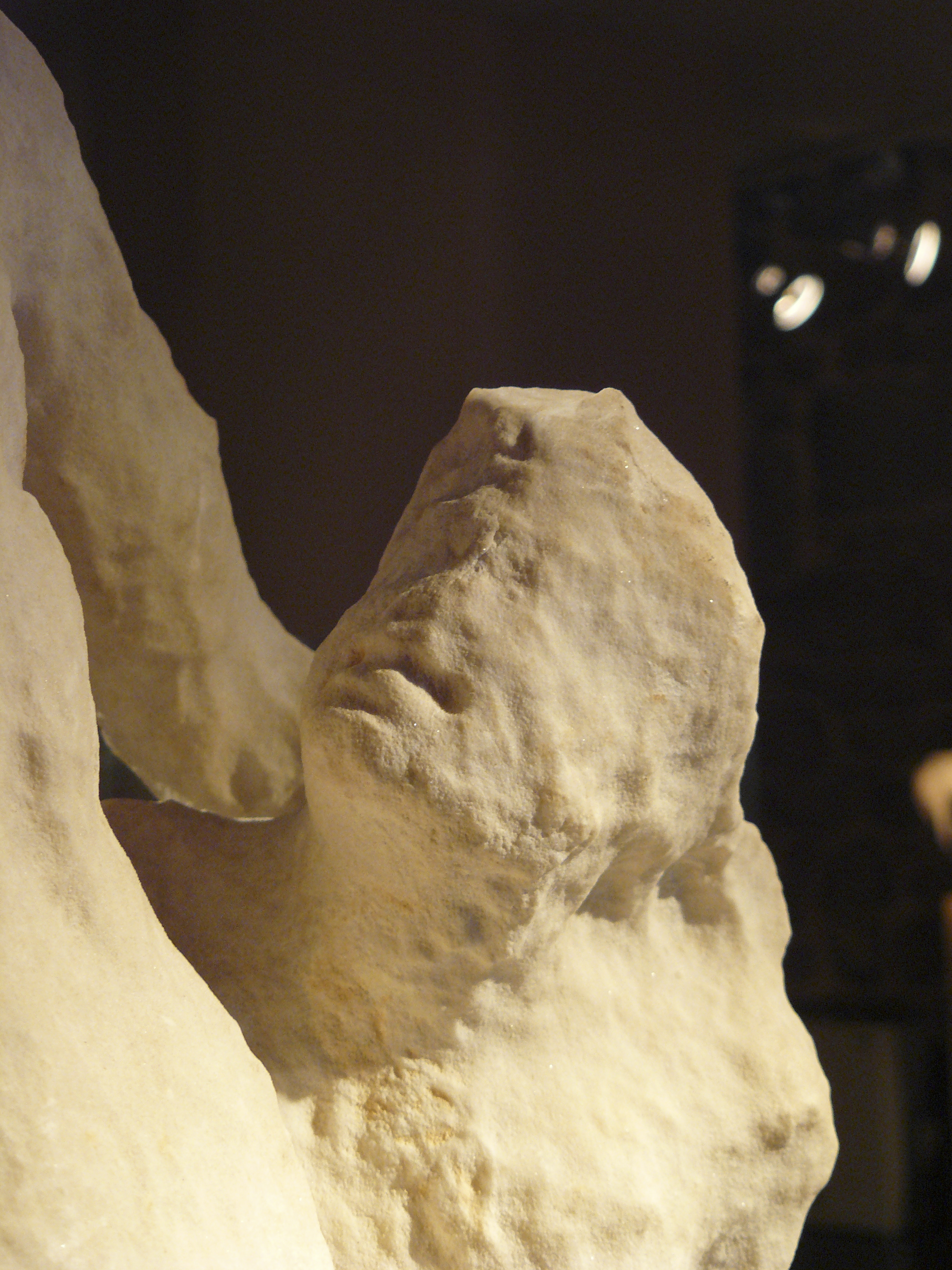 Detalle da Estatua de Dionisos e Sátiro